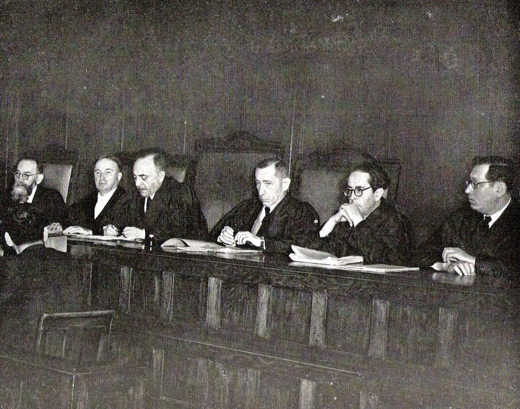 he:בית המשפט העליון של מדינת ישראל, או בשמו דאז "בית הדין העליון" בראשות אב בית הדין he:משה זמורה. מימין לשמאל: he:שמעון אגרנט, he:משה זילברג, he:מנחם דונקלבלום, he:משה זמורה, he:יצחק אולשן, הרב he:שמחה אסף.